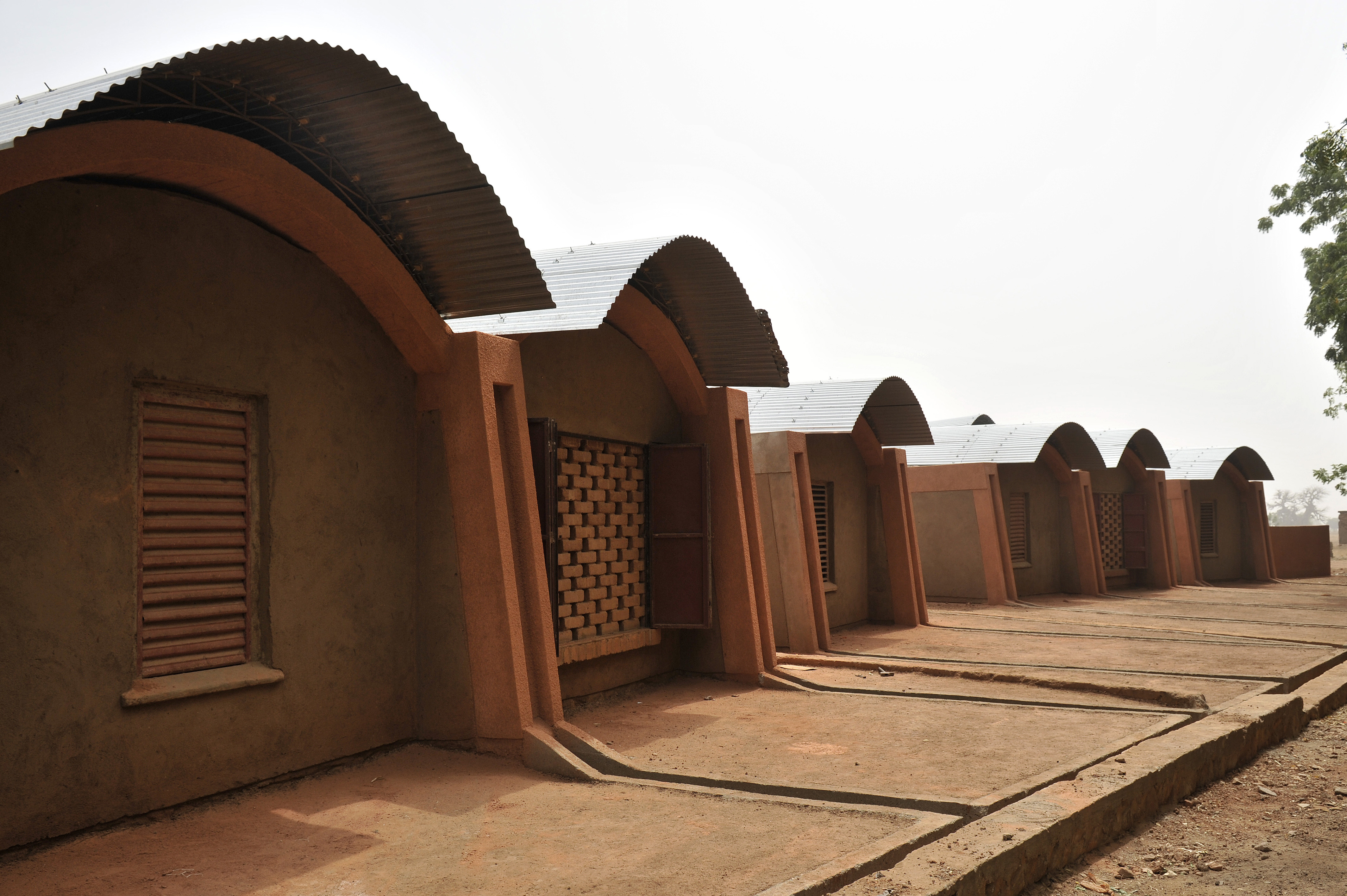 Teachers' housing in Gando, Burkina Faso. Designed by Francis Kéré.